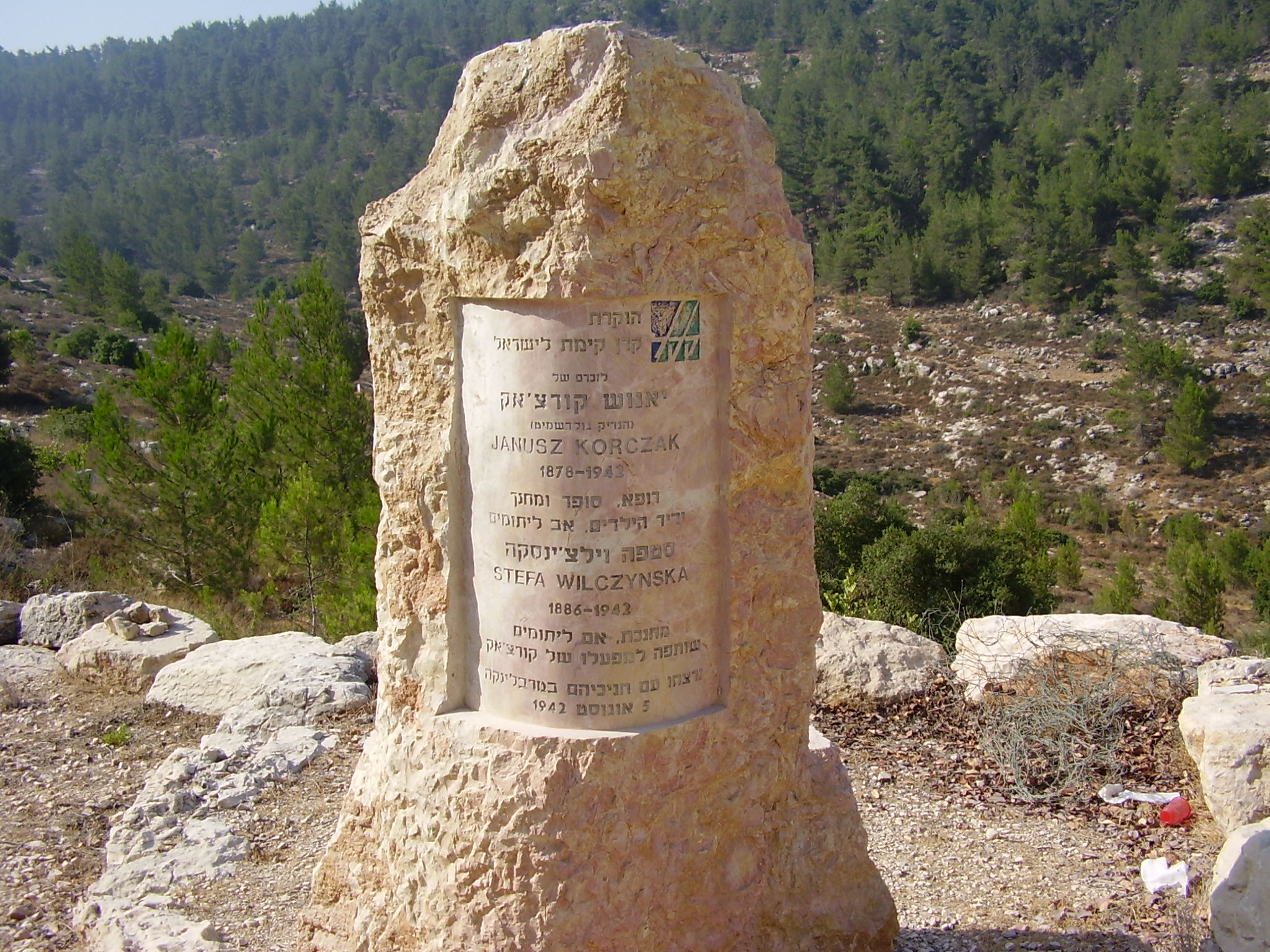 אנדרטת הנצחה ליאנוש קורצ'אק ולסטפניה וילצ'ינסקה ביער יהדות פולין בהר הרוח.